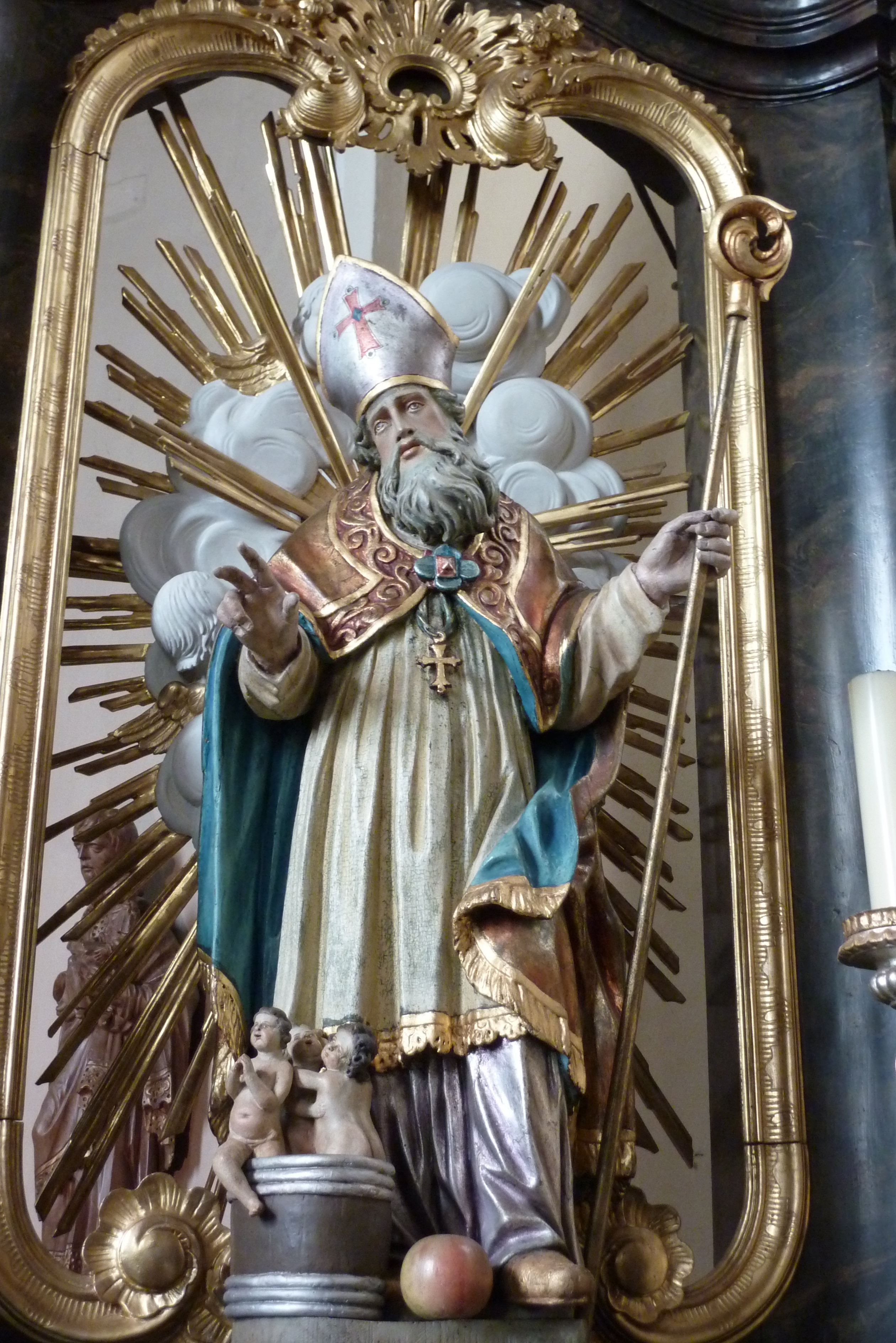 Statue des hl. Nikolaus im rechten Seitenaltar der katholischen Pfarrkirche St. Nikolaus in Aremberg